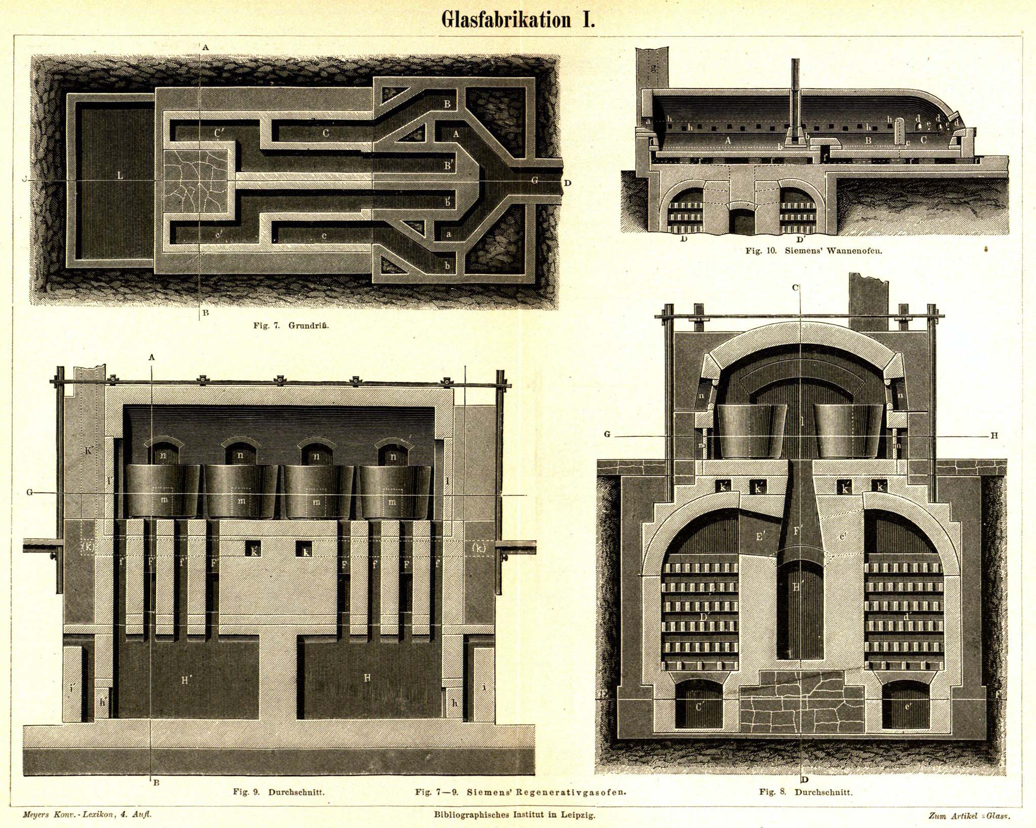 Glasfabrikation